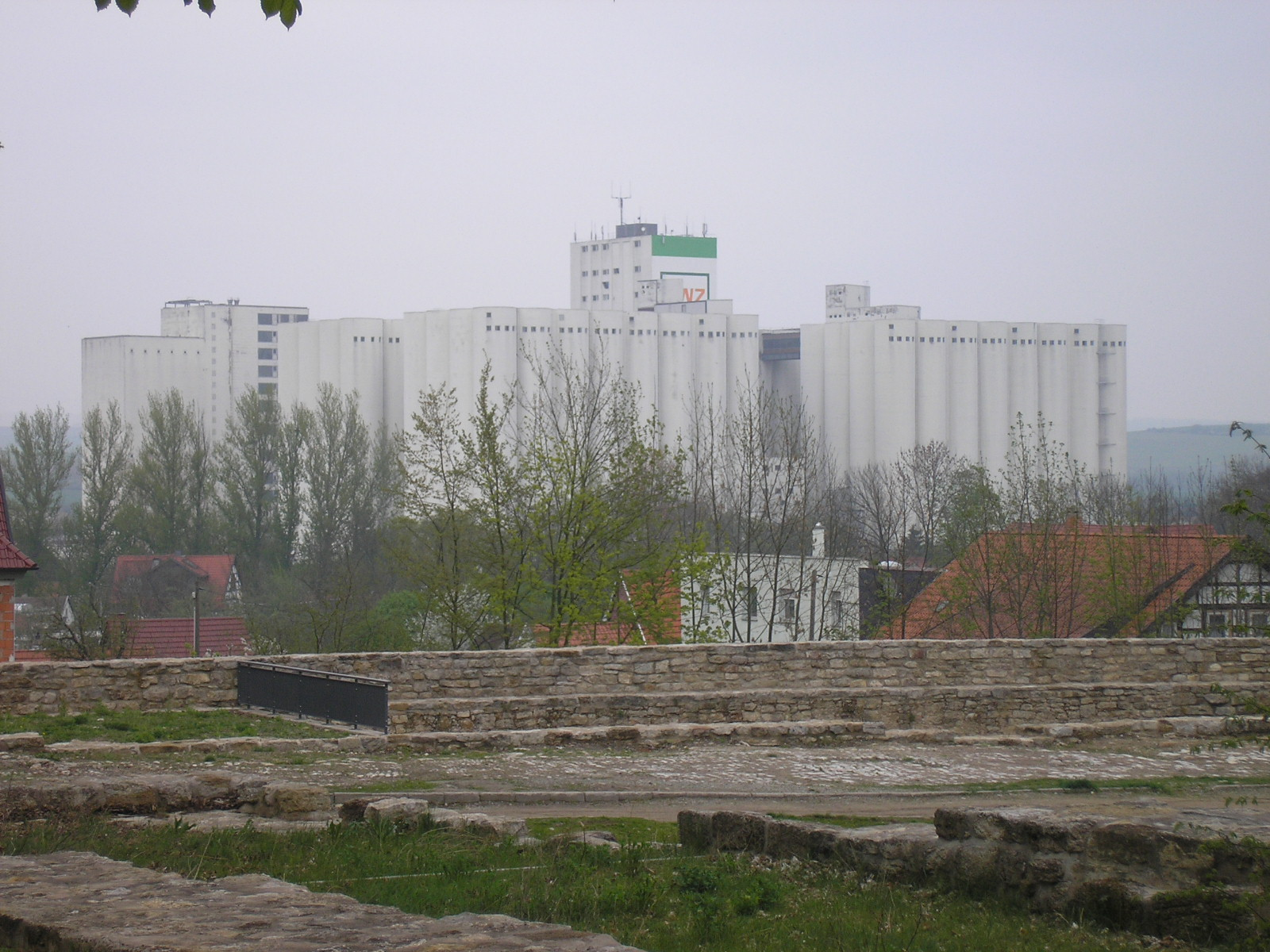 Eine Silo-Anlage in Ebeleben (Thüringen, Germany).